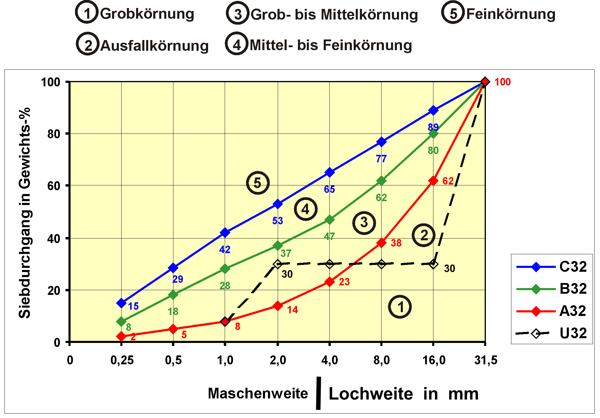 Sieblinie für Betonzuschlaggemische mit einem Größtkorn von 2 mm nach DIN 1045-2 / Anhang L